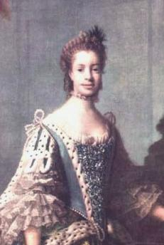 Königin Sophie Charlotte (Mecklenburg-Strelitz)